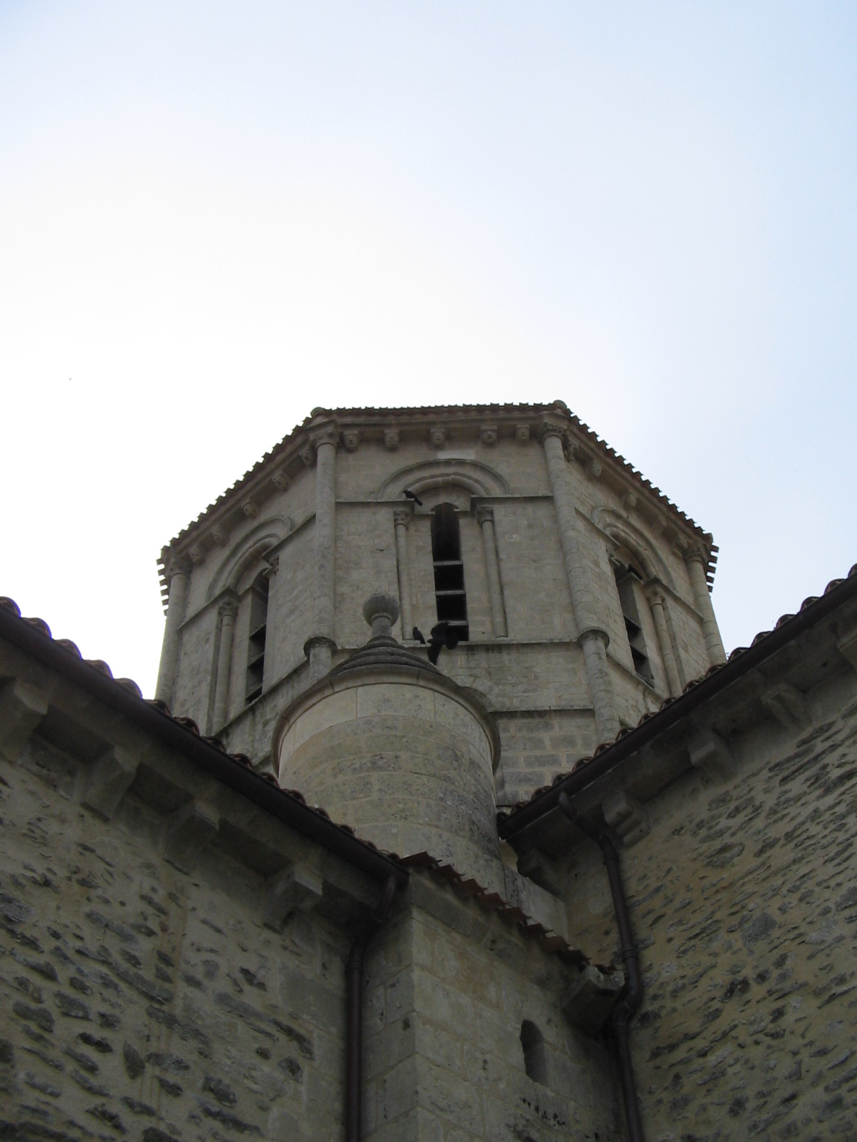 le clocher de l'église de Fenioux 79